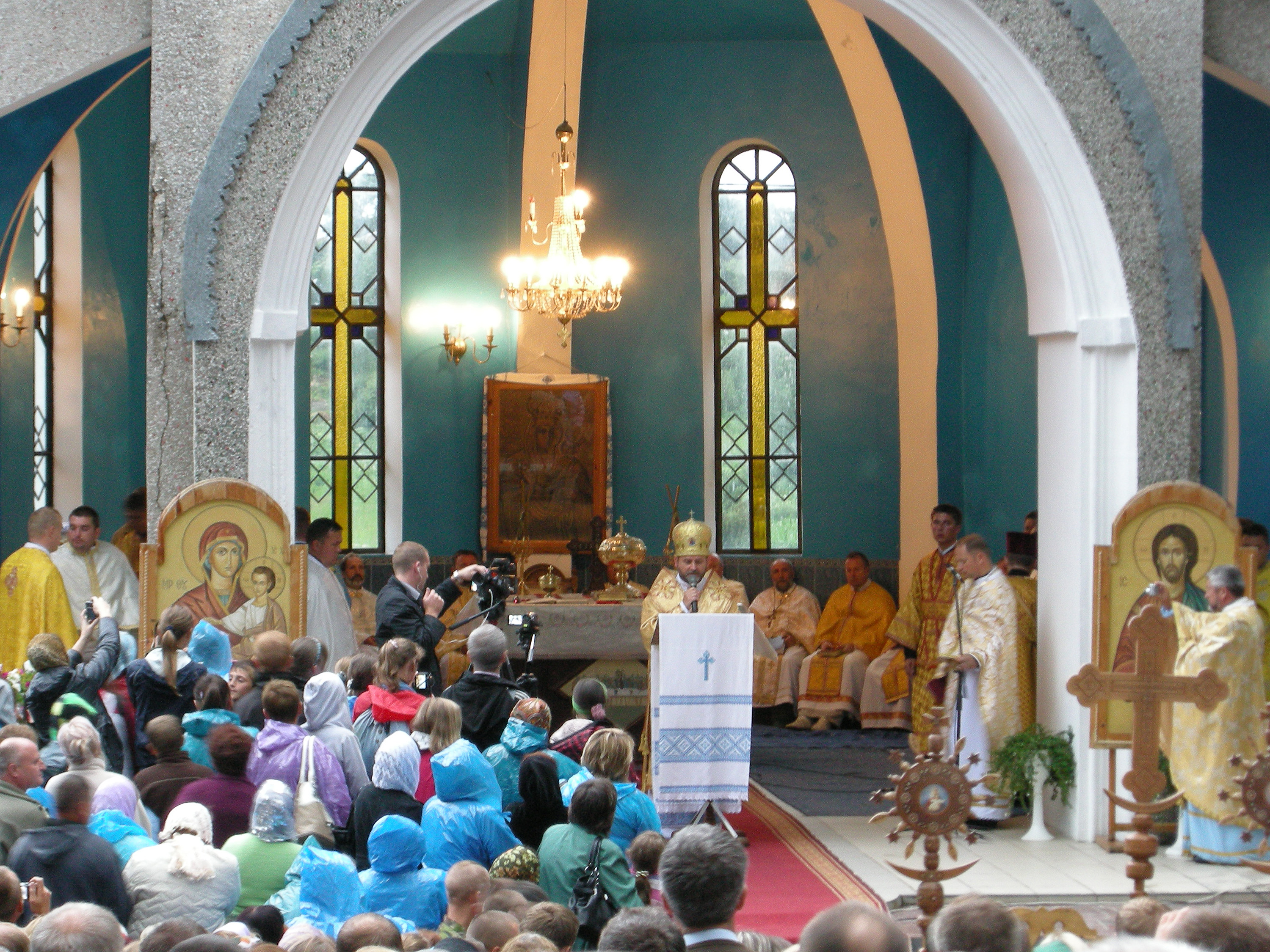 Всеукраїнська проща до Зарваниці 2013 року. Літургія біля парафіяльної церква Пресвятої Трійці.